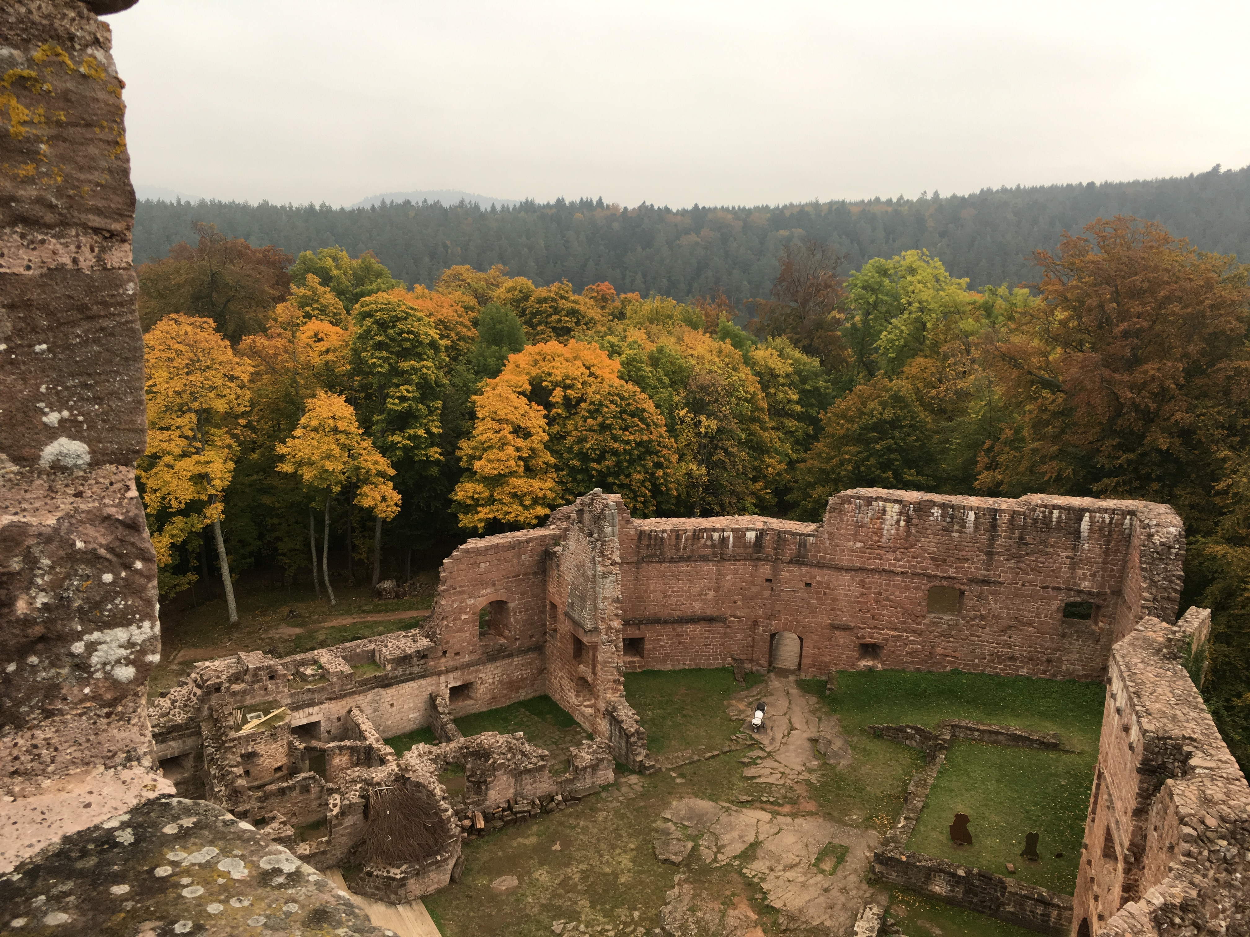 Wangenbourg le château vue de la tour